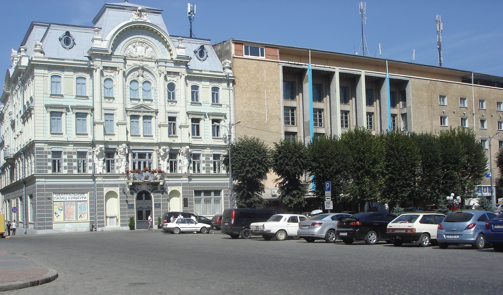 фото будинку, де розміщено музей